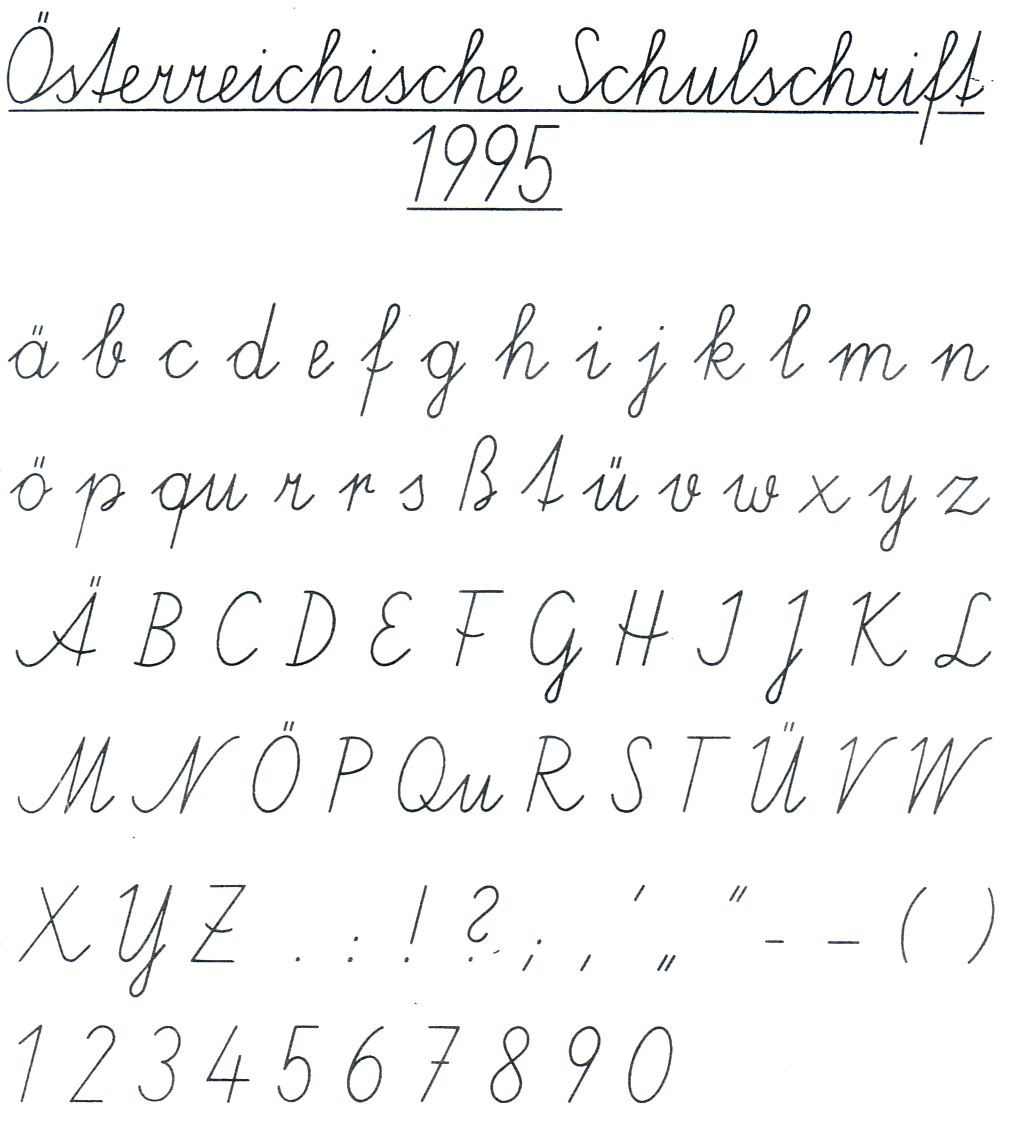 Österreichische Schulschrift seit 1995